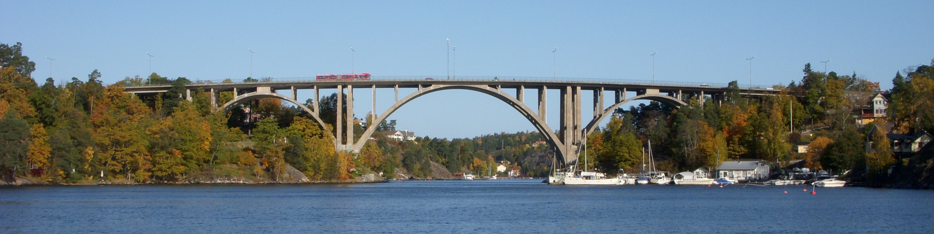 Skurubron i Nacka. En buss passerar över bron. Båtar ligger vid vattnet nedanför.